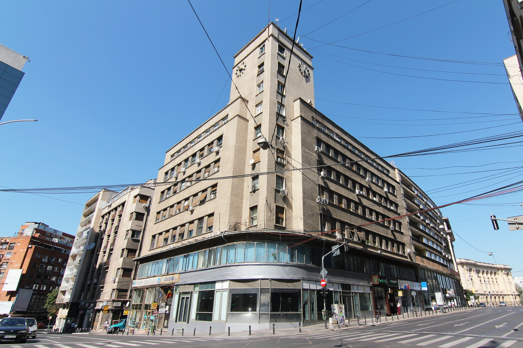 Blocul Adriatica